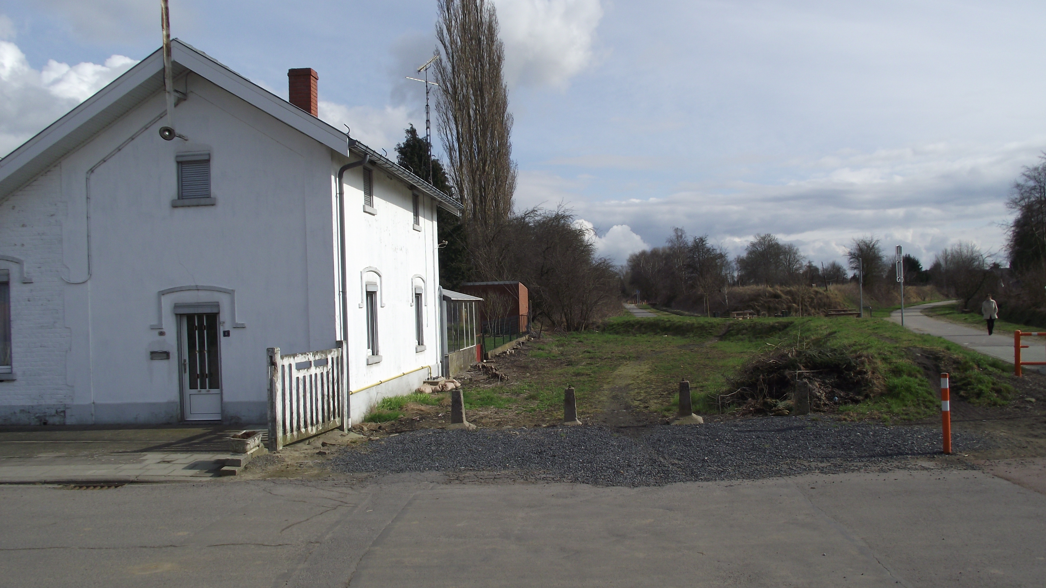 Splitsing spoorlijnen 109 en 111 met wachterhuis in Thuillies. Beide spoorlijnen zijn verbouwd als RAVel fietspad.